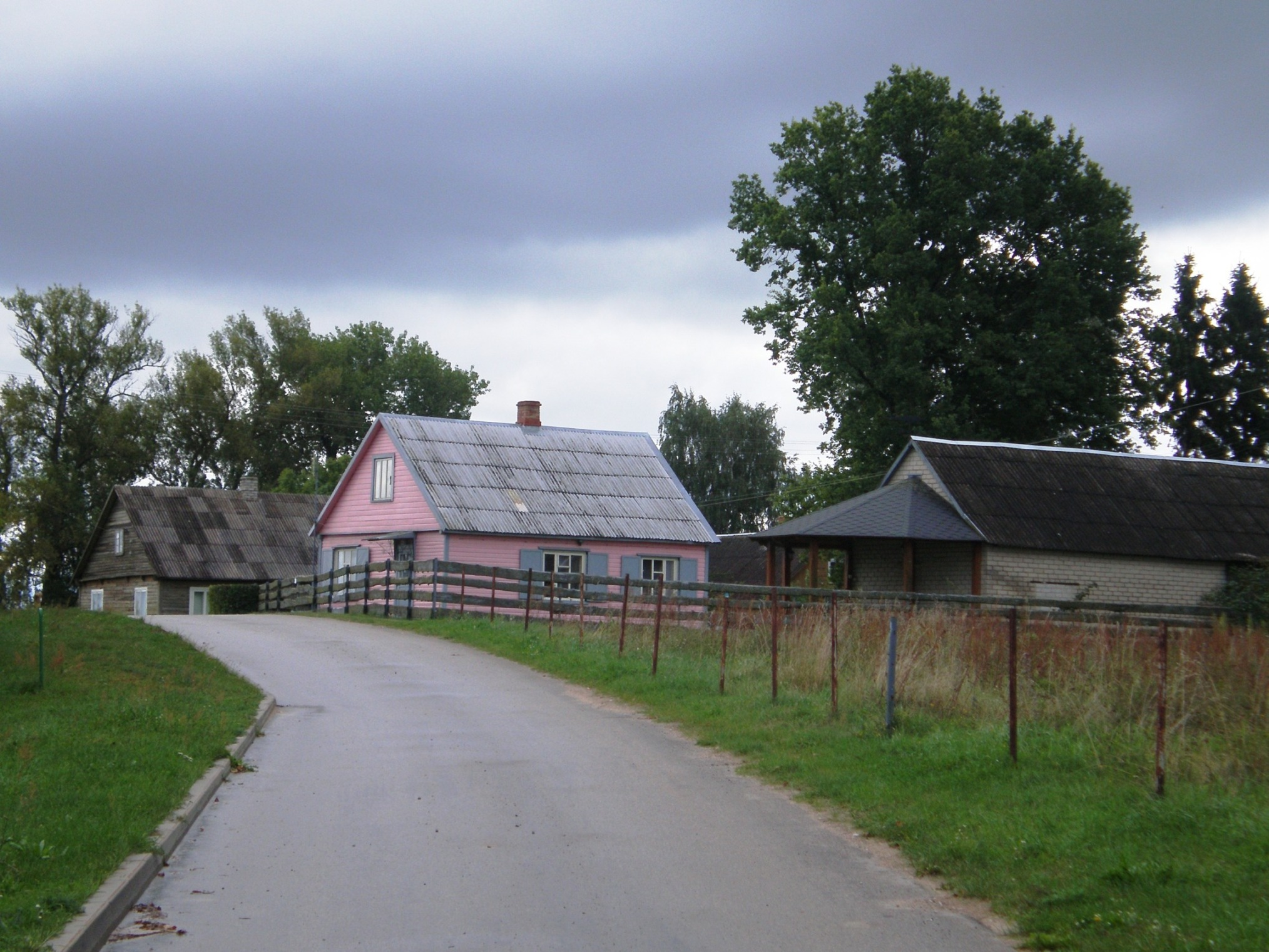 Meteliai, Lazdijų raj.